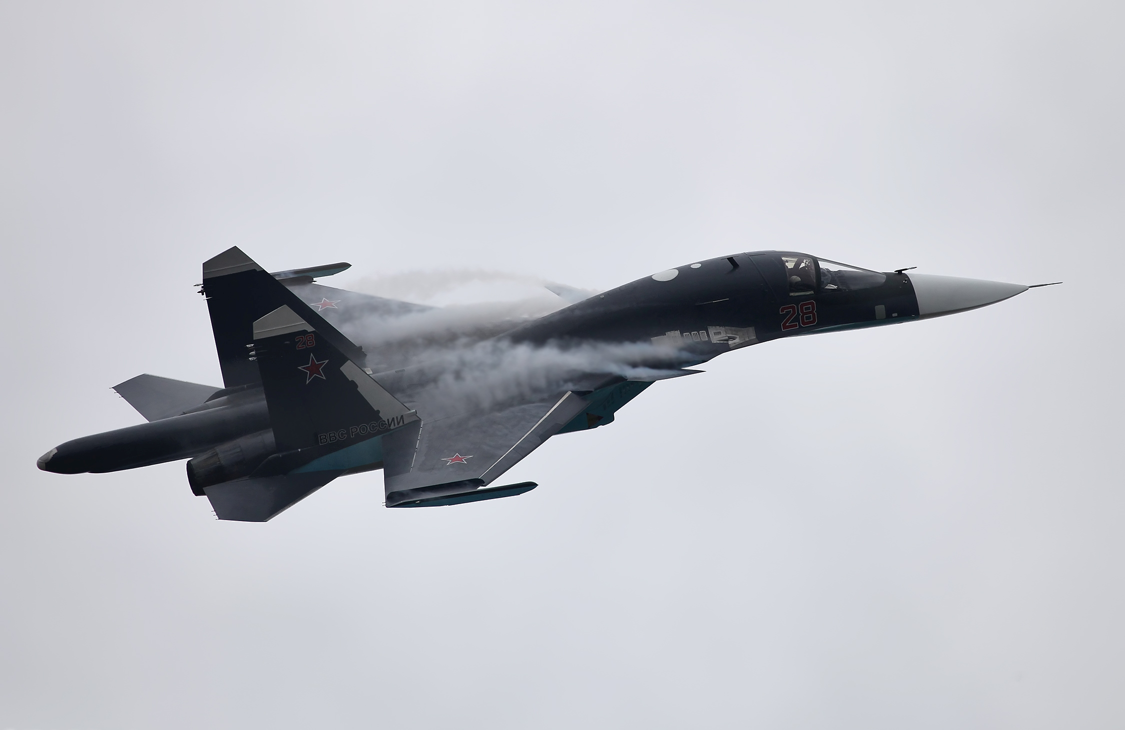 Сольный пилтаж Су-34 (Su-34 solo aerobatics)